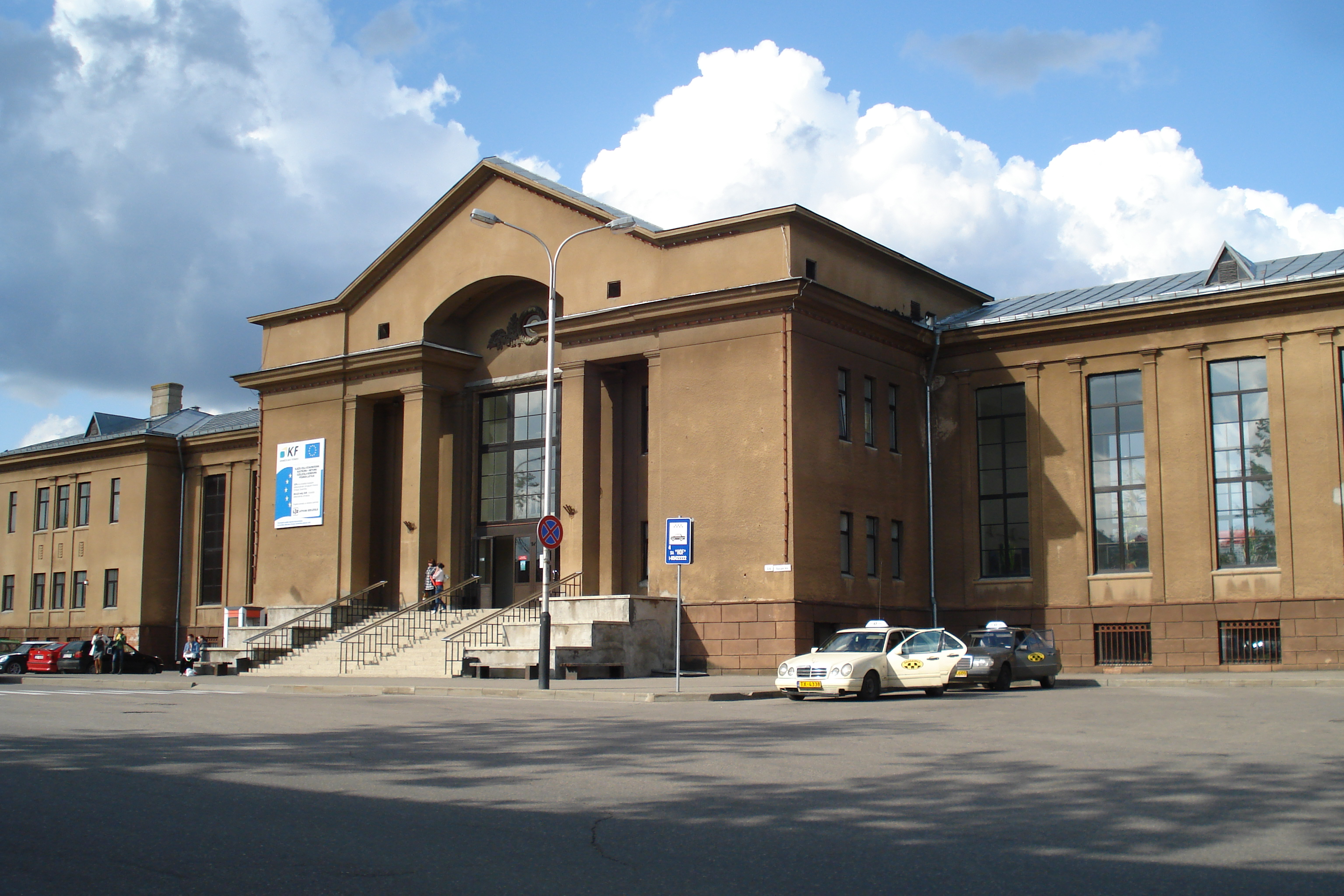 Railway station of Daugavpils city. Железнодорожный вокзал станции Даугавпилс (1951)